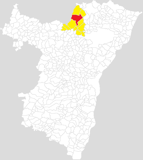 Communauté de communes du Pays de Niederbronn-les-Bains